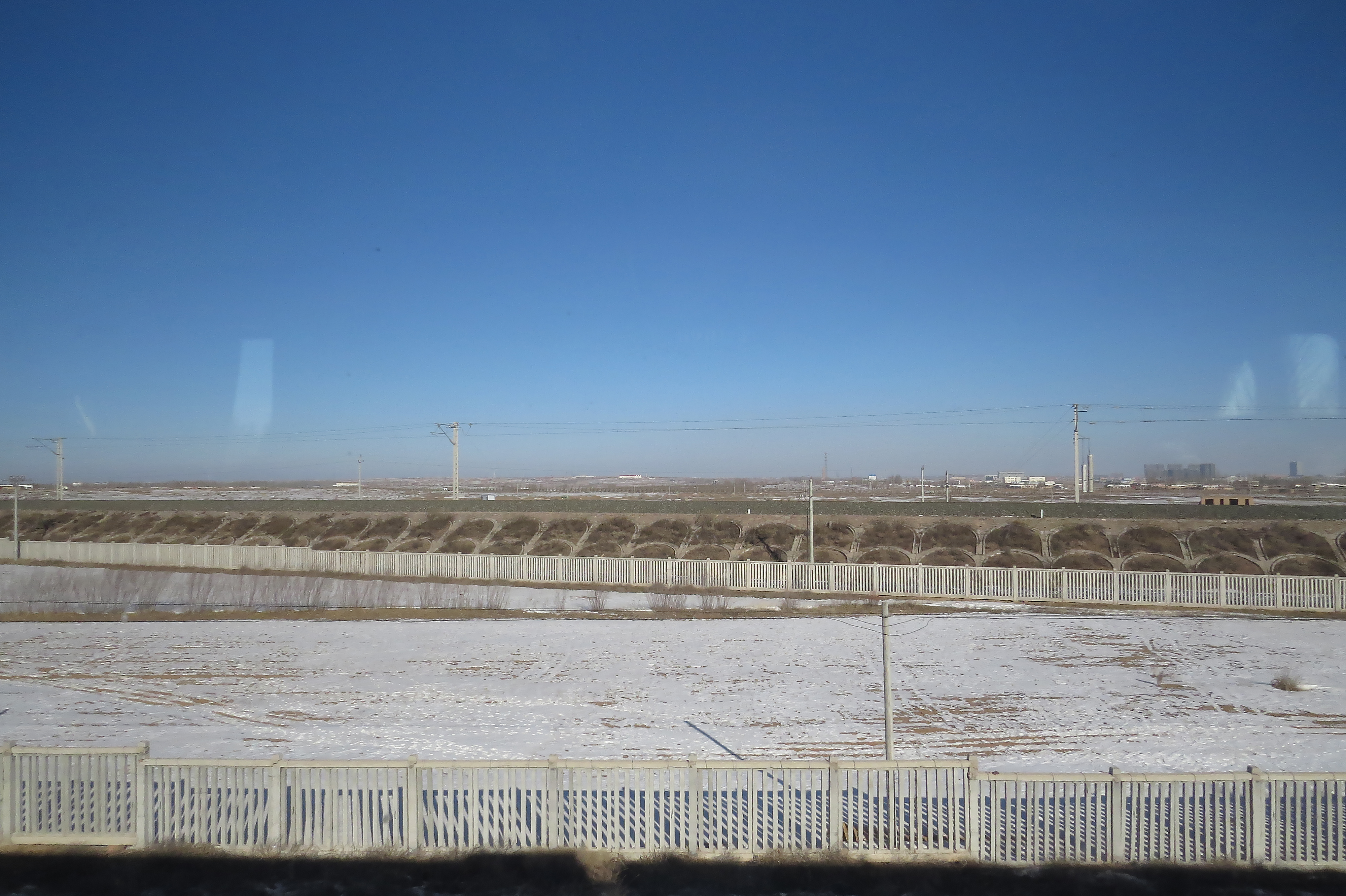 太中银铁路定银支线（定边端）